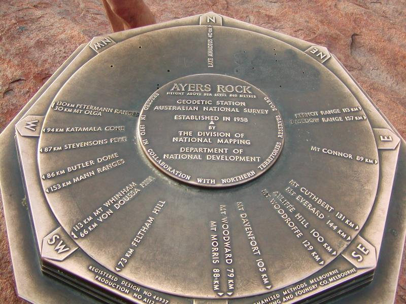 Plaque au sommet d'Uluru Auteur : Utilisateur:THA-Zp